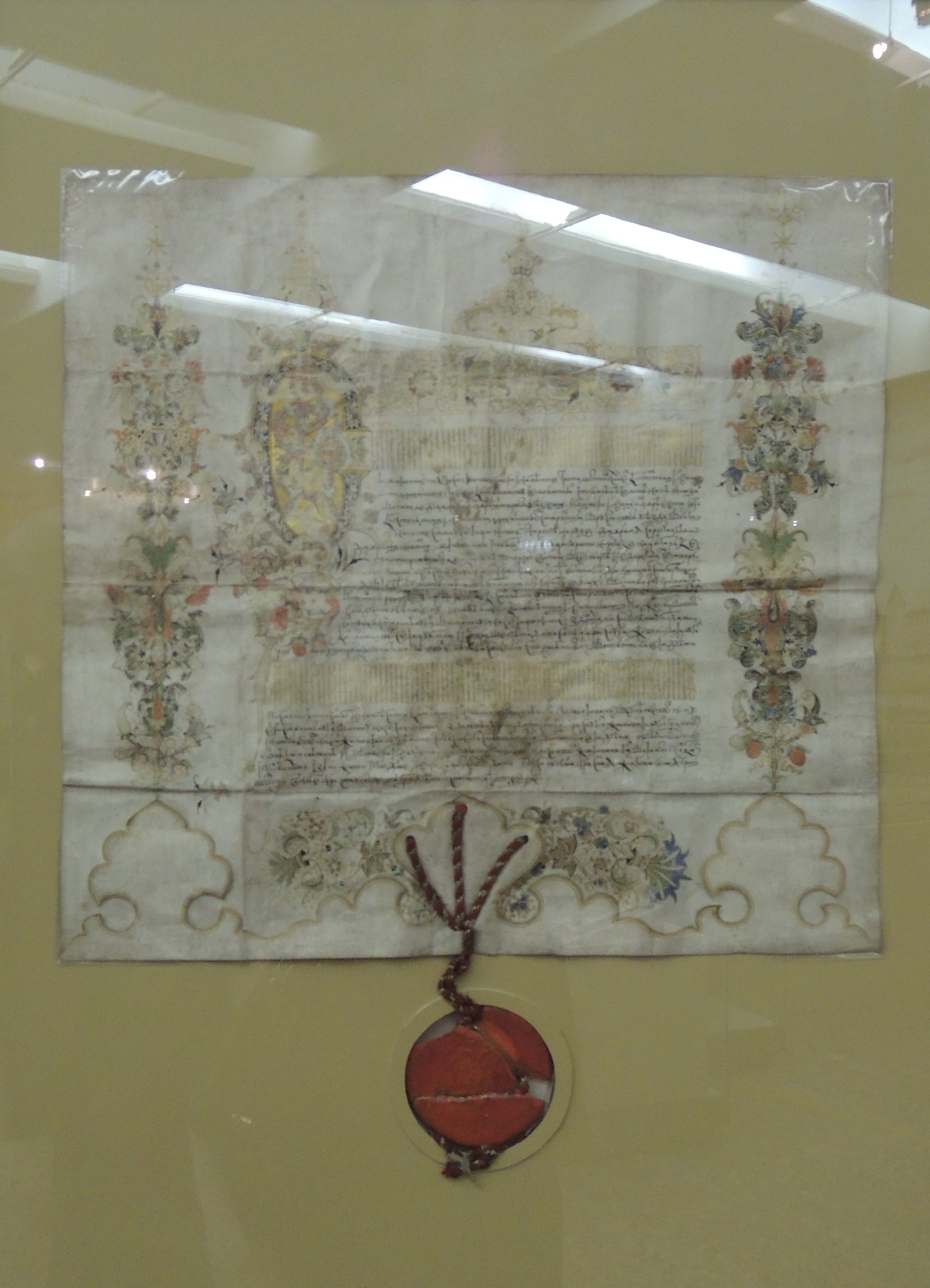 Жалованная грамота царя Михаила Федоровича постельничему К.И. Михалкову на вотчины. 1615. ОПИ ГИМ.